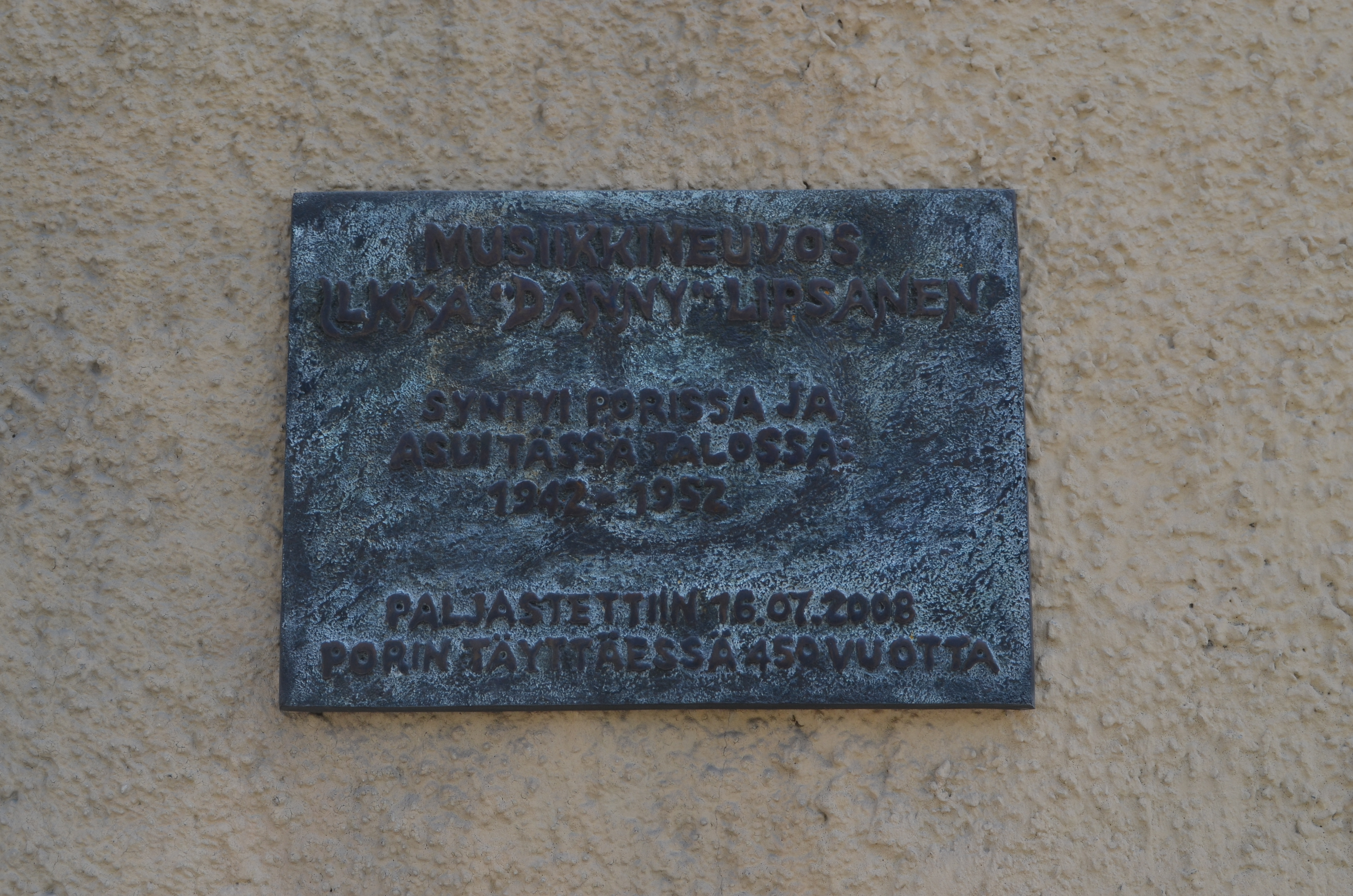 Ilkka Lipsasen syntymäkodin muistolaatta, Antinkatu 6, Pori. Pystyttäjä: Porin kaupunki ja Solo ry. Paljastettiin 16.7.2008, Porin täyttäessä 450 vuotta.